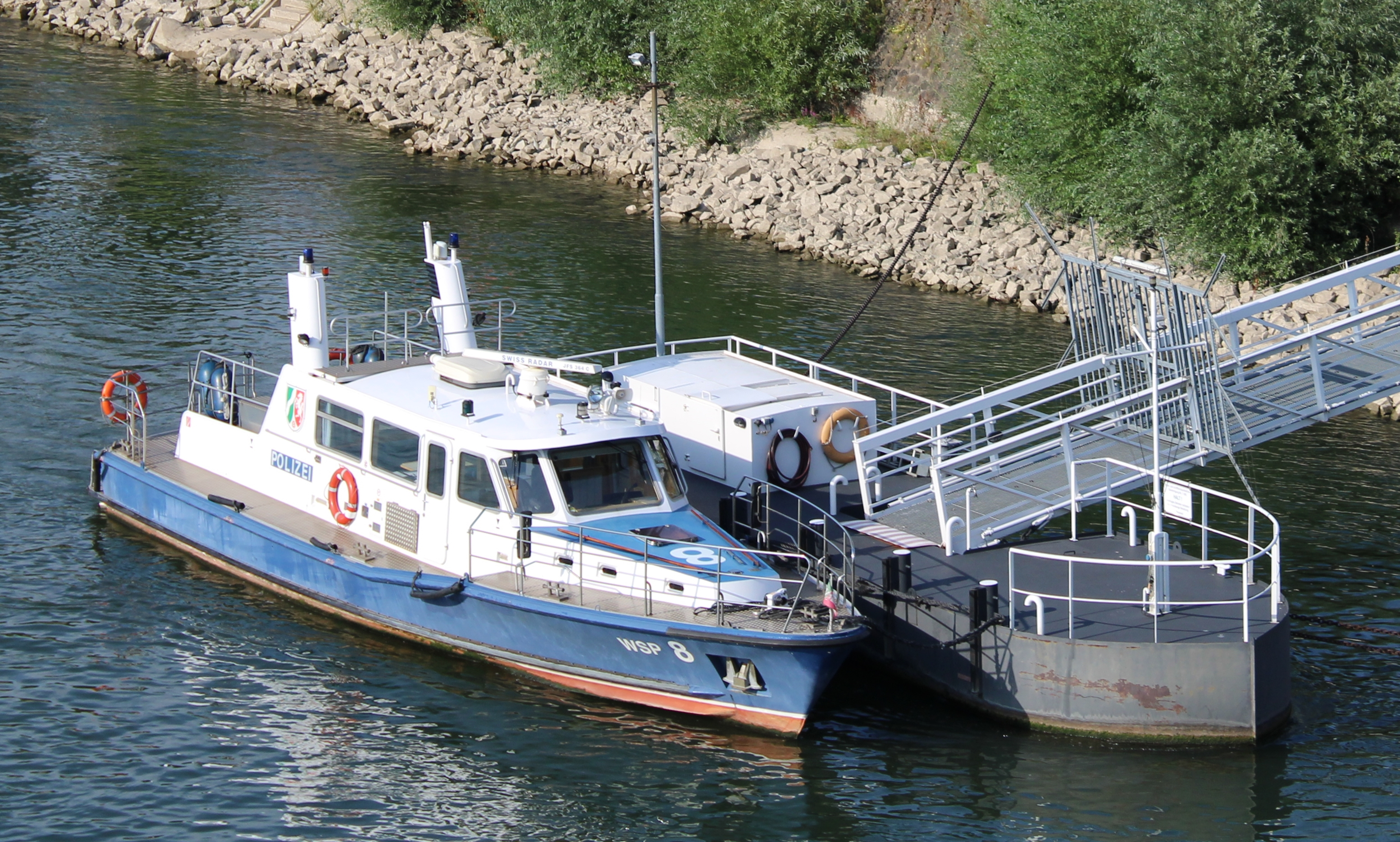 Deutschland, NRW, Bonn: Wasserschutzpolizei, Anleger in Bonn-Beuel unweit der Kennedy-Brücke: Polizeiboot WSP 8.